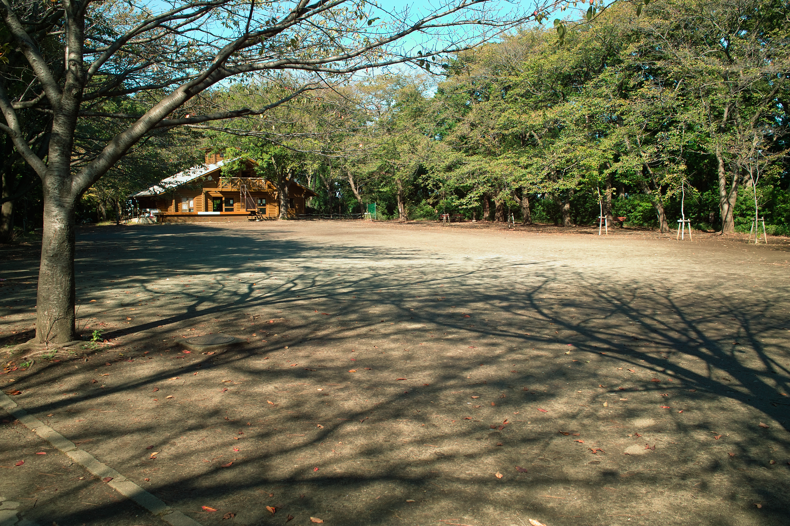 綱島公園